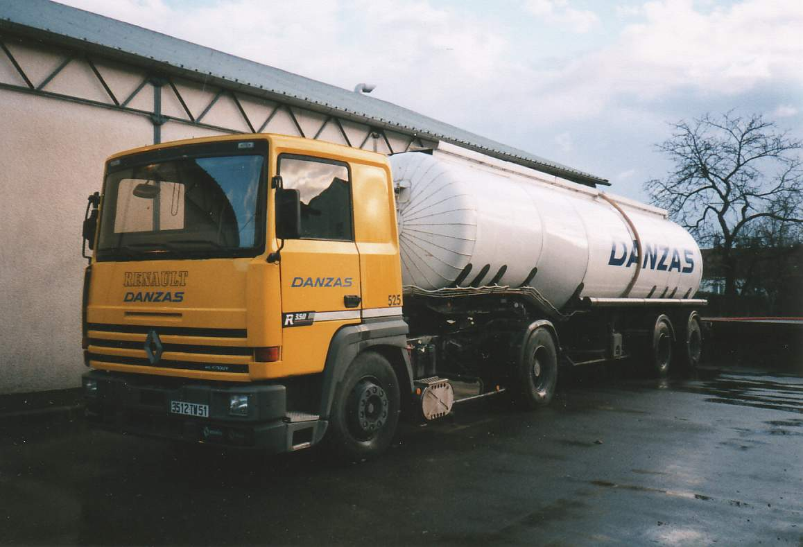 RENAULT R350 TRANSPORTS DANZAS EPERNAY, COLLECTION FRANCIS CANY